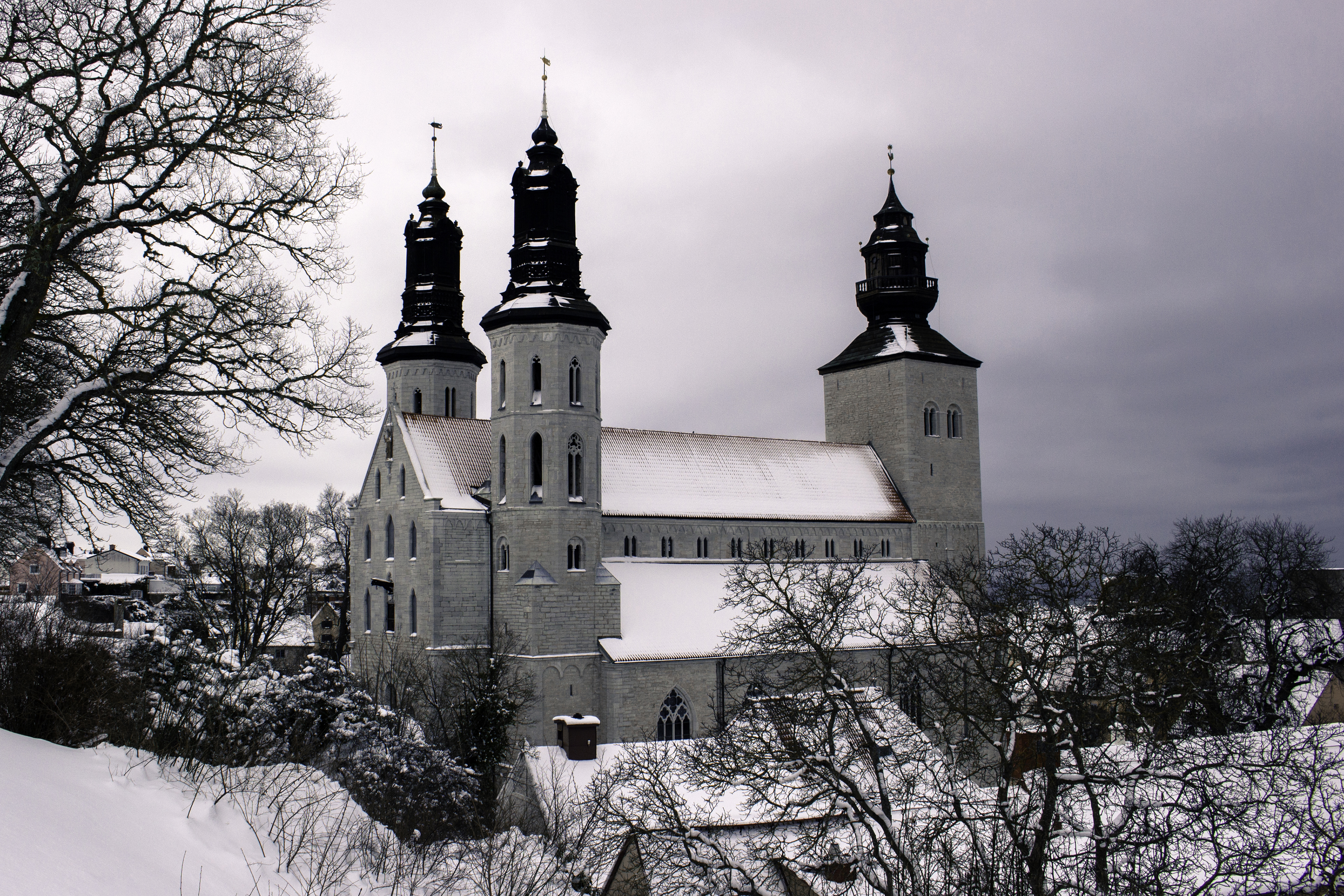 Fachada norte da catedral de Visby cuberta de neve.